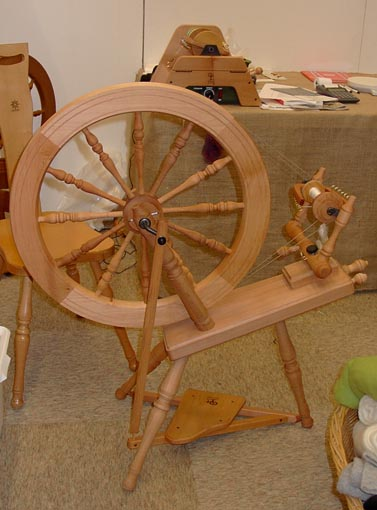 Foto: Damast Kategori:Vävning:Bilder